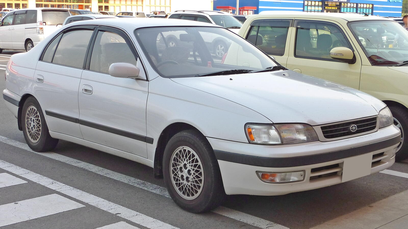 トヨタ・コロナ（T190型・後期型）